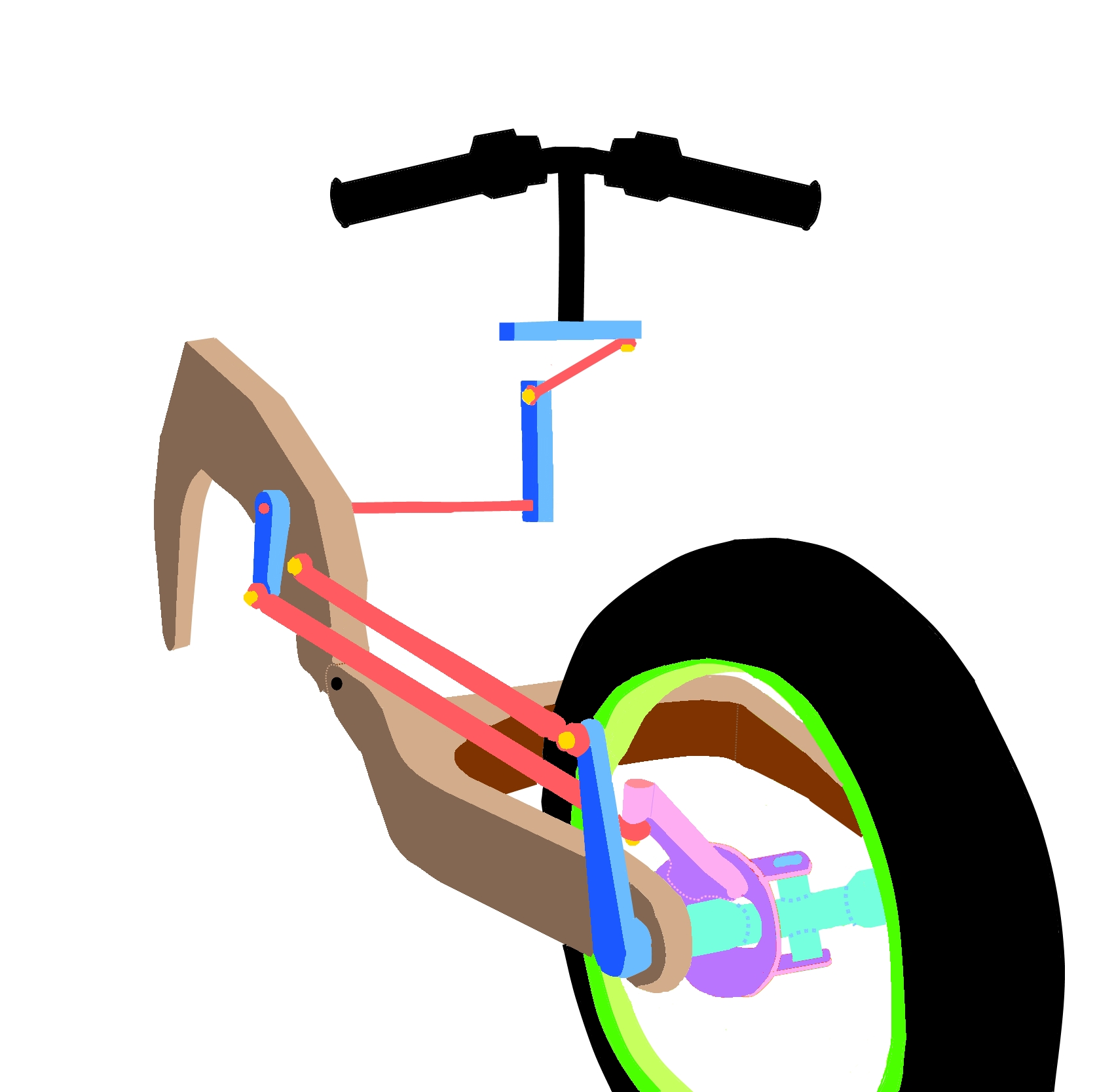 Schéma du principe de fonctionnement de la direction de la Bimota Tesi